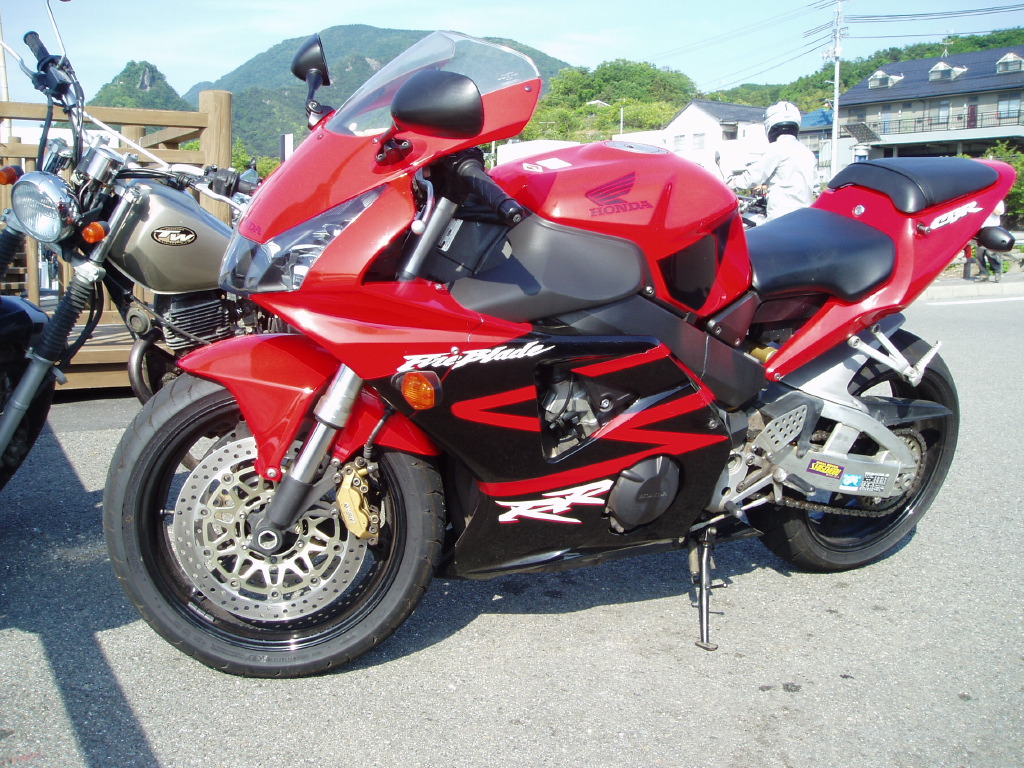 2003年式 CBR954RR ED(英国)仕様 2006年ふたみシーサイド公園にて撮影。 撮影者：--みかんの国のバイク糊